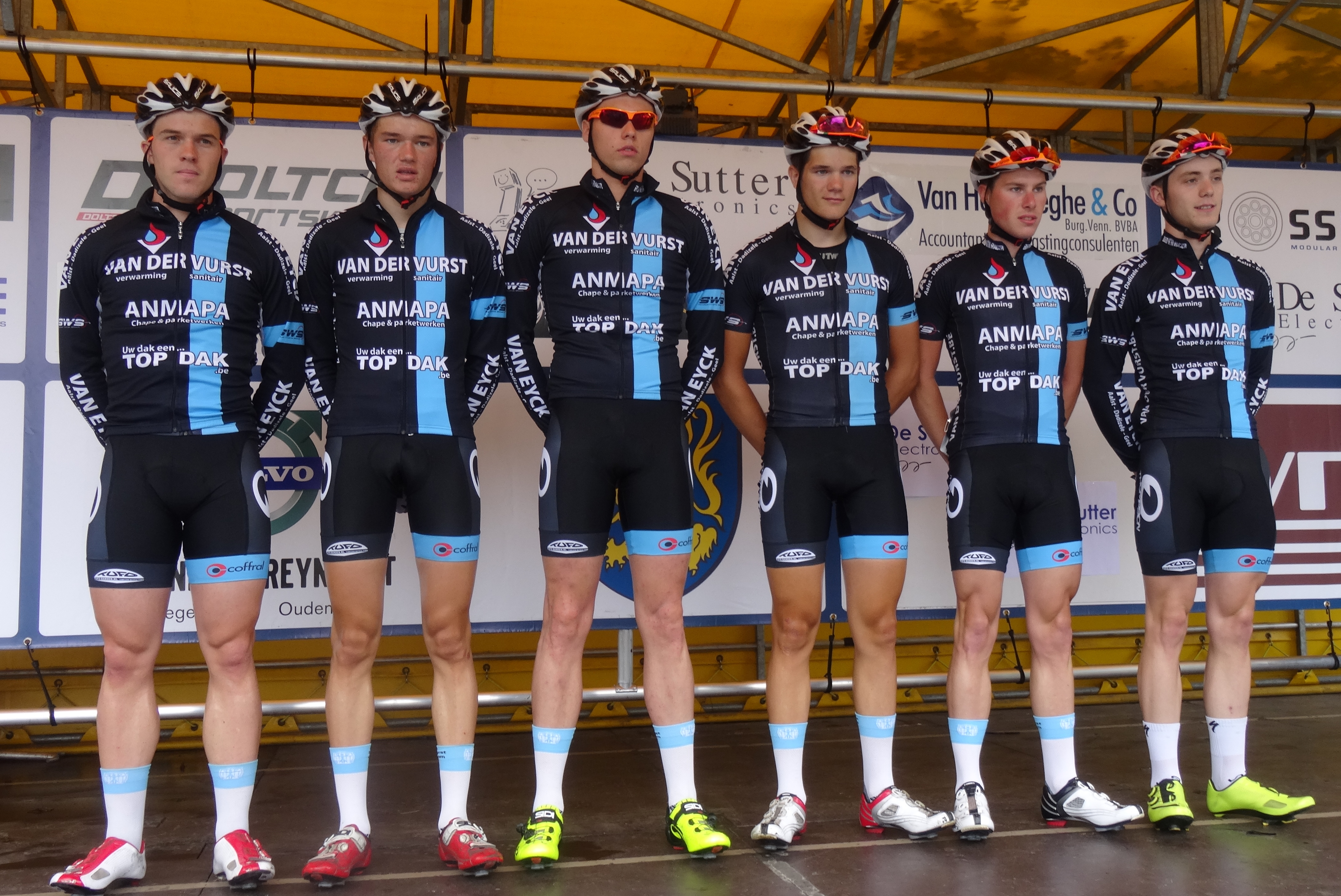 Reportage photographique réalisé le samedi 5 juillet à l'occasion du départ et de l'arrivée du Circuit Het Nieuwsblad espoirs 2014 à Grotenberge (Zottegem), Belgique.